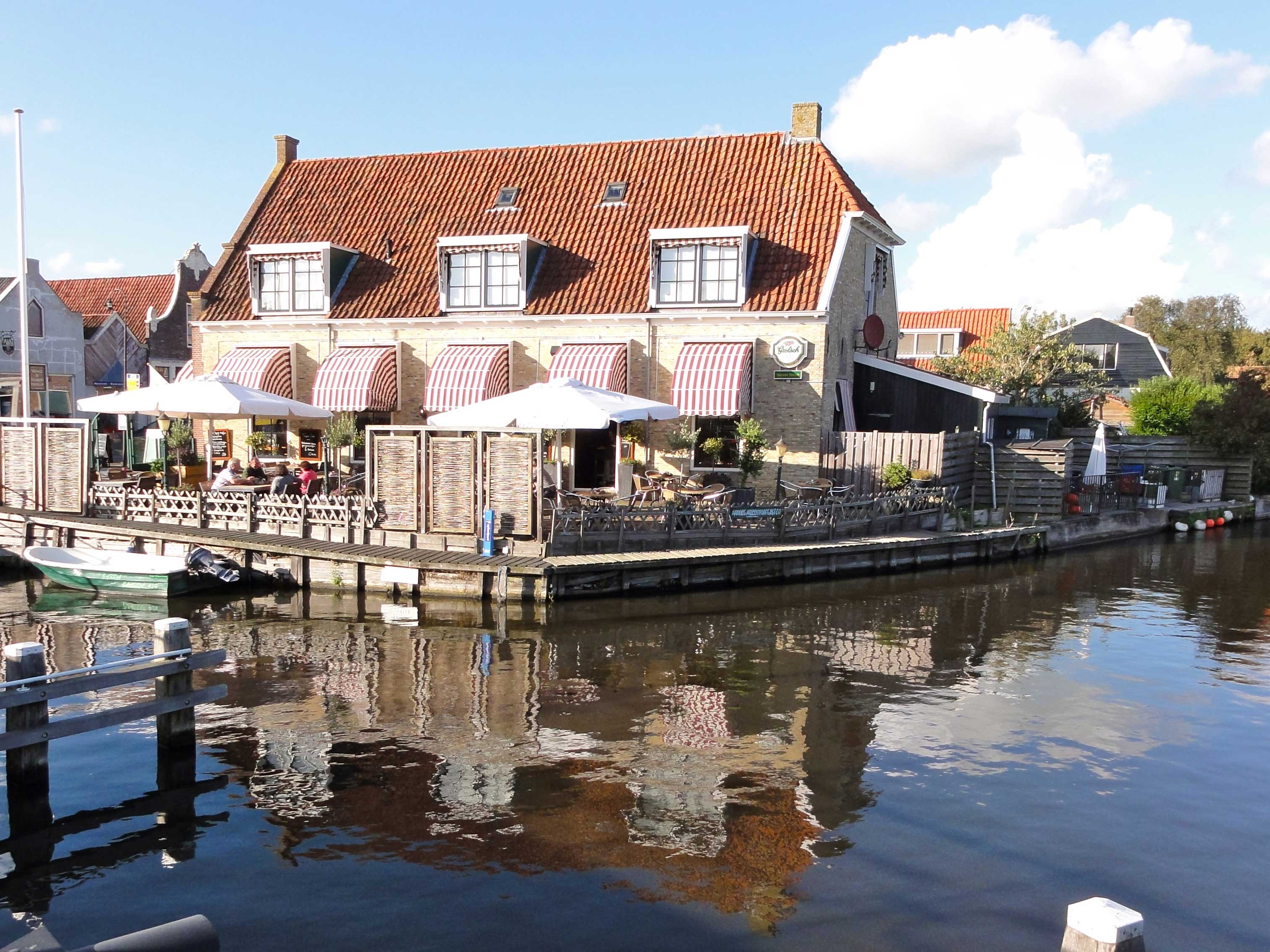 Súd 119 in Workum